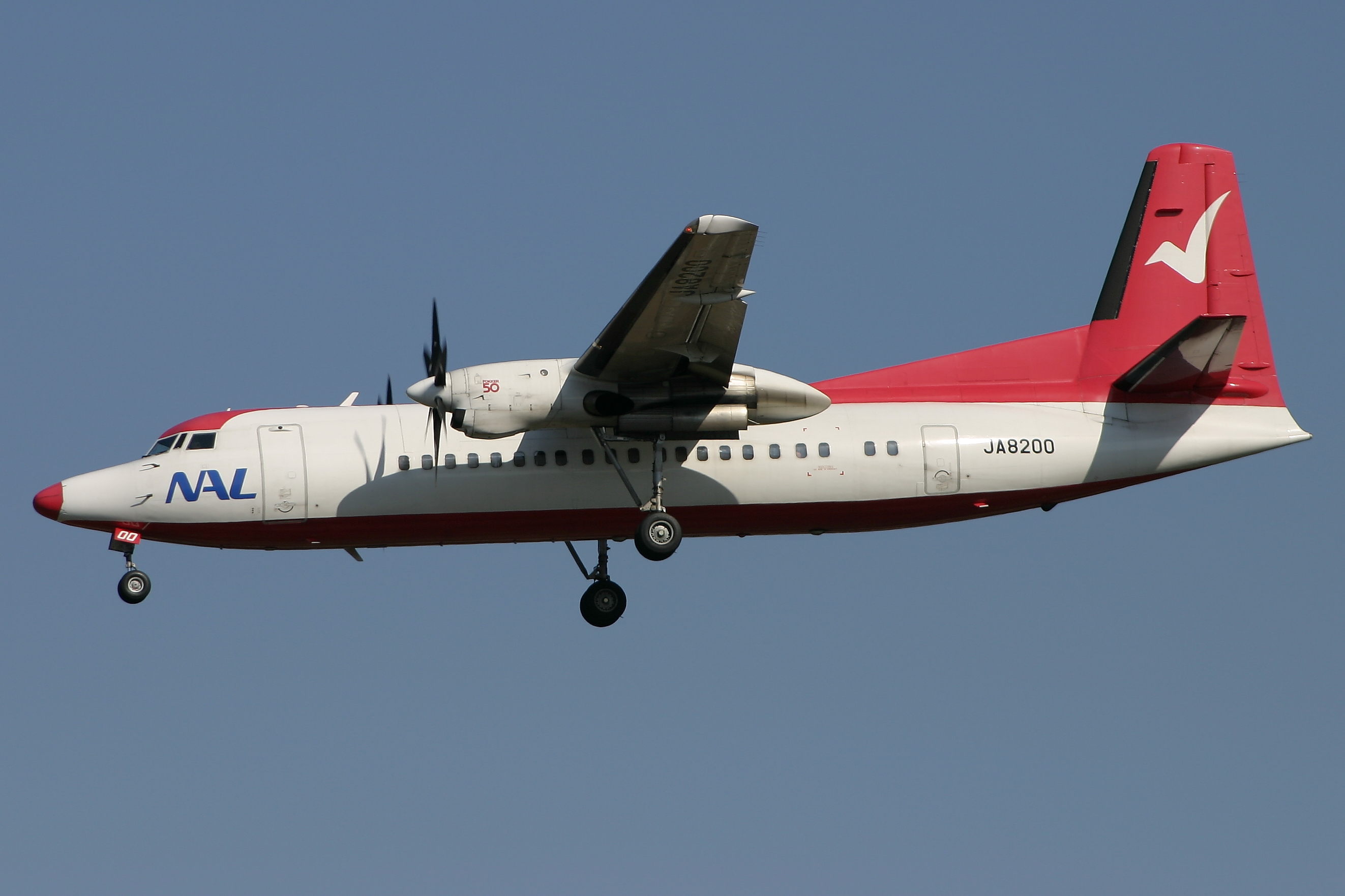 中日本エアラインサービス フォッカー 50 JA8200 福岡空港